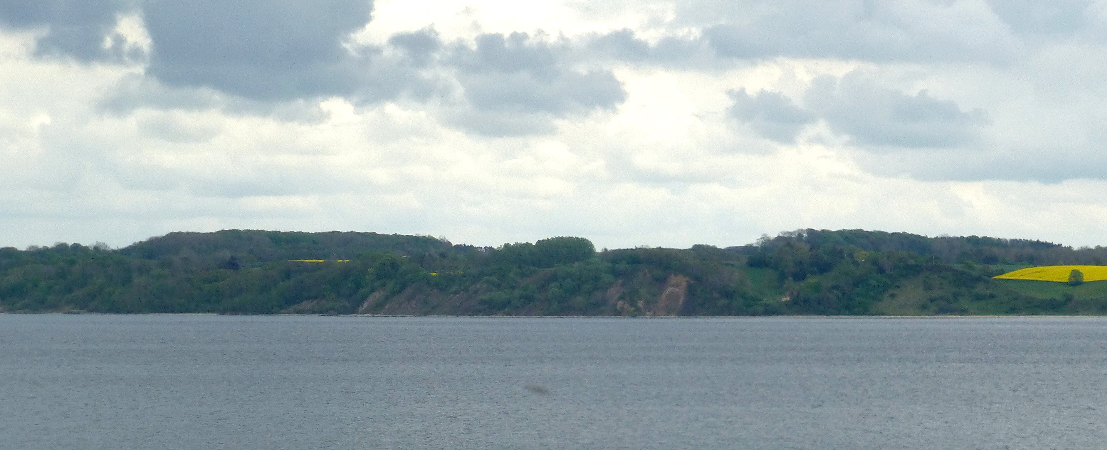 Røjle Klint on Funen seen from Fredericia